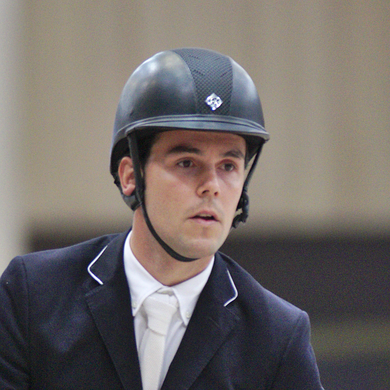 CHI Genève 2013 - 20131214 - Sergio Alvarez Moya et Zipper